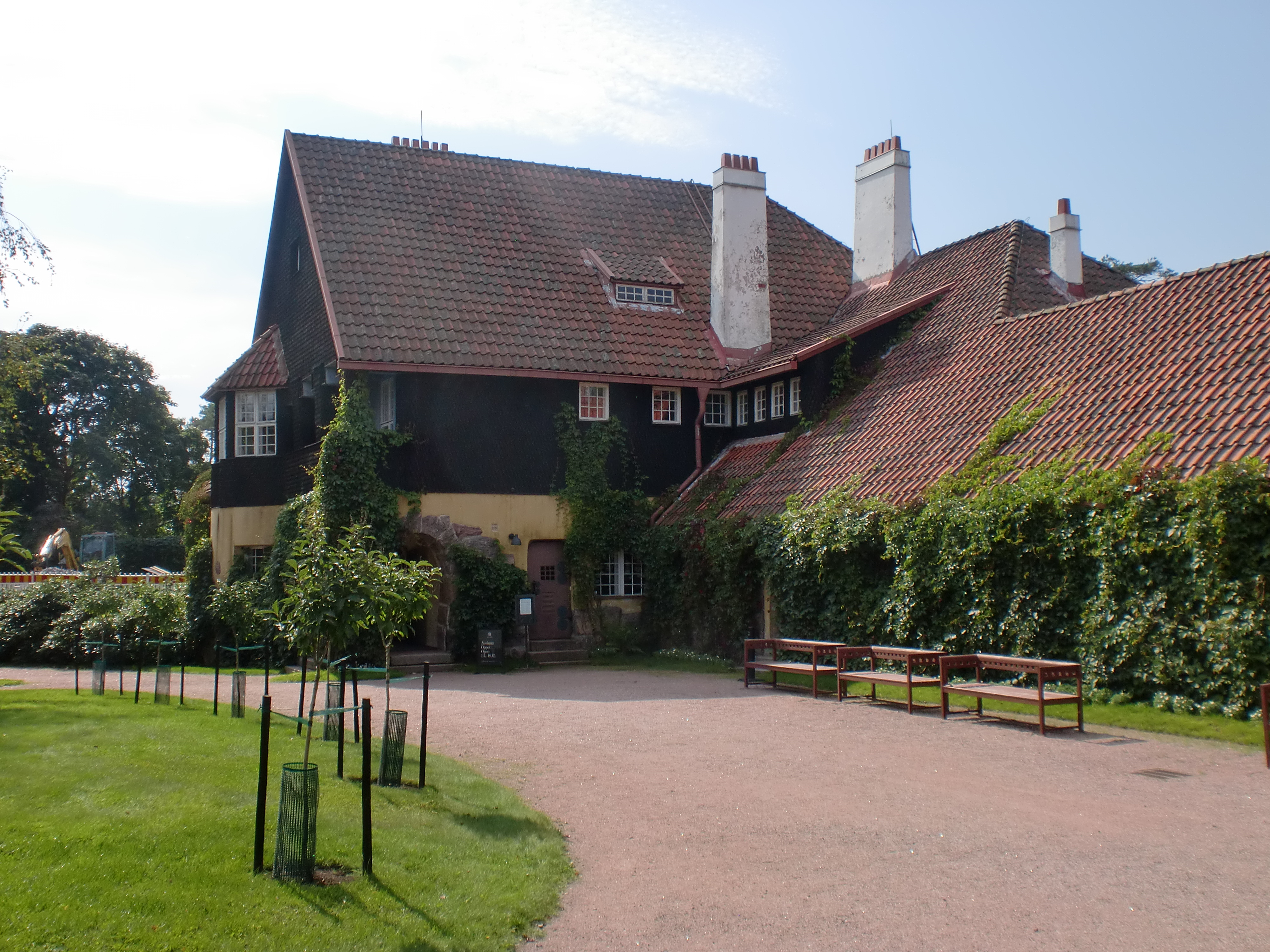 Hvitträsk; taiteilijakoti ja kulttuuriympäristö Kirkkonummella